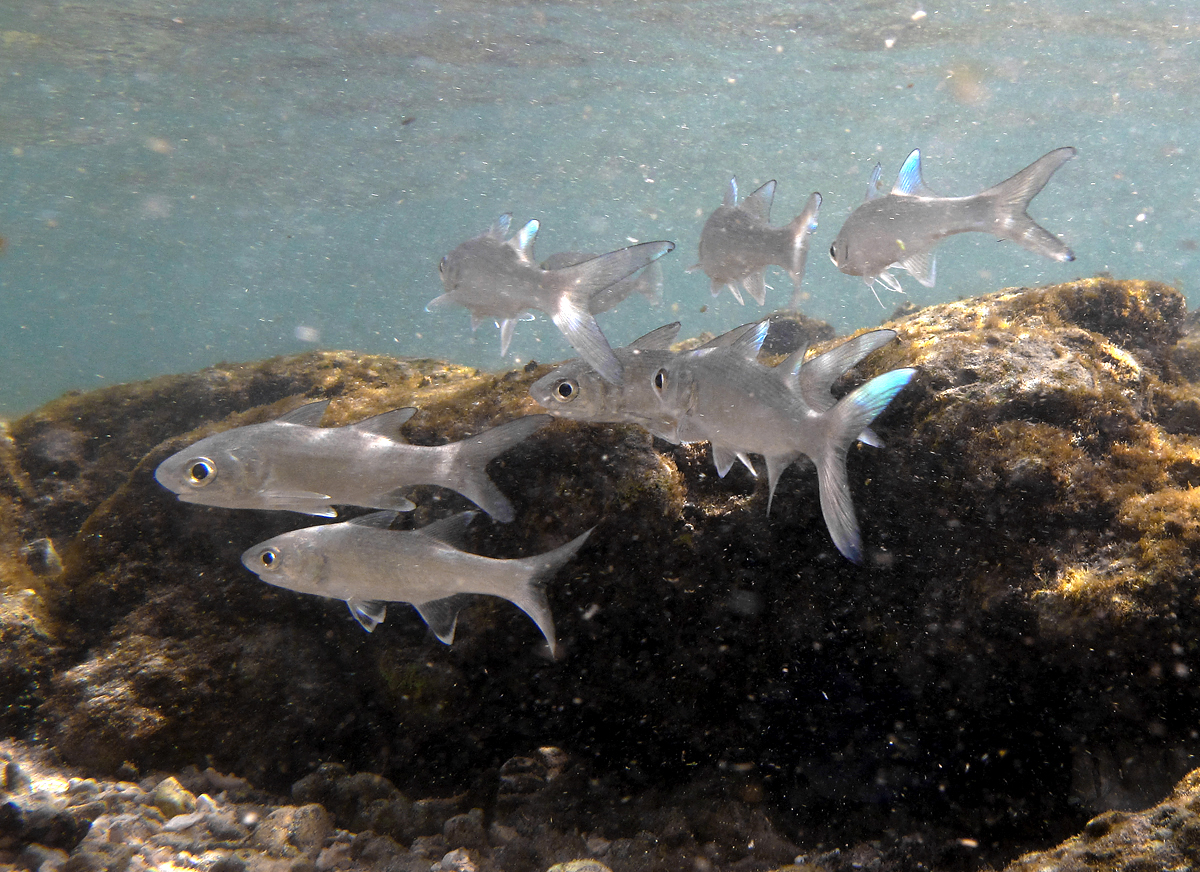 Groupe de barbures rayées (Polydactylus plebeius) à la Réunion.